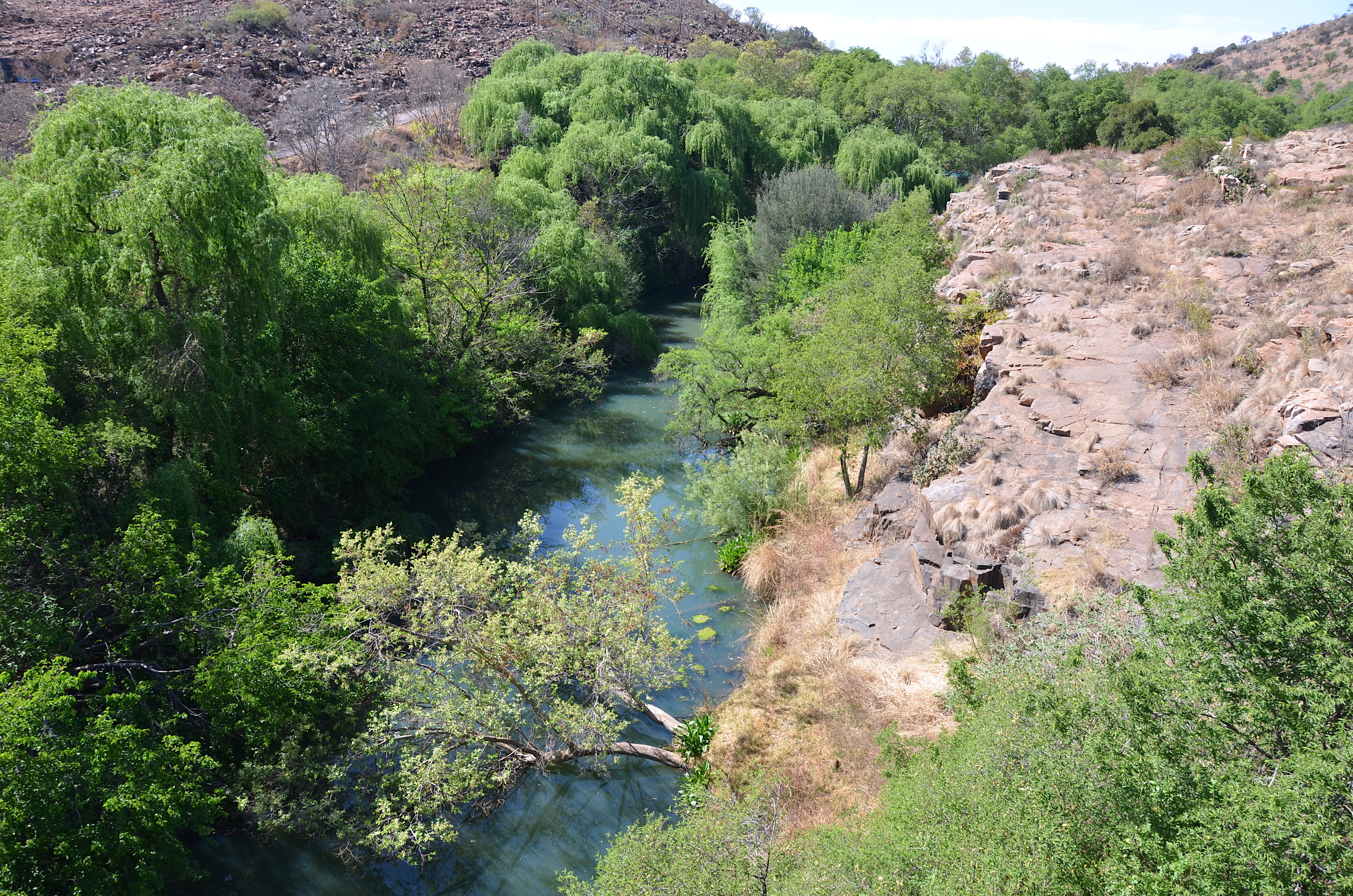 Magaliesrivier in Südafrika